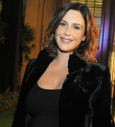 Guilhermina de Oliveira Sampaio Guinle (Rio de Janeiro, 26 de julho de 1974) é uma atriz brasileira. Foto tomada em evento de moda.